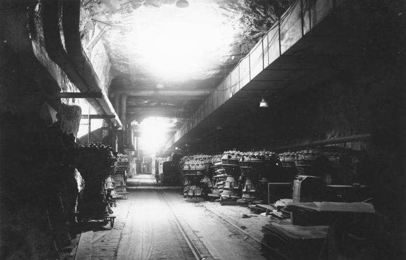 G8501 A 219